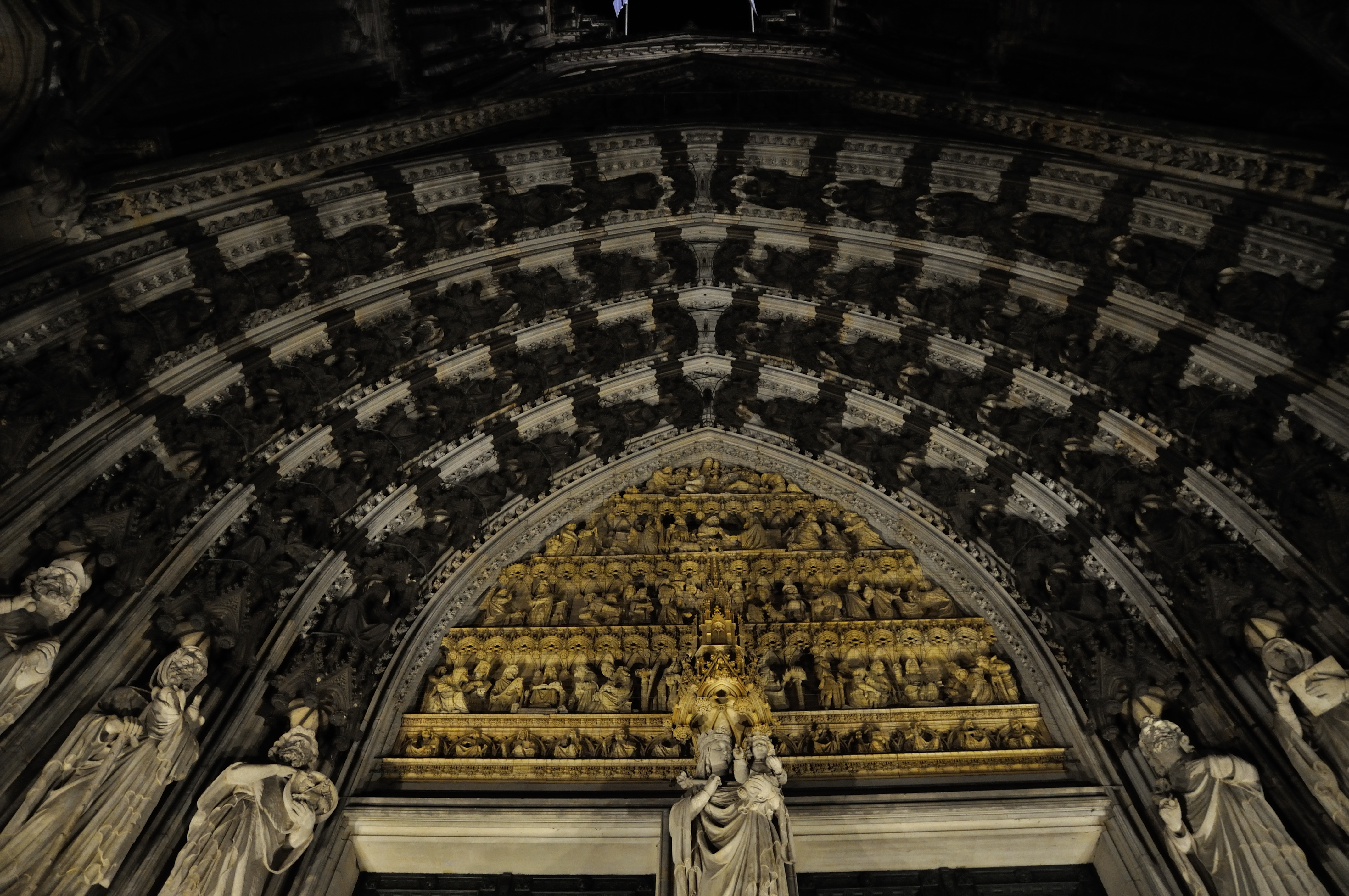 Torbogen Westseite des Kölner Doms bei Nacht This is a photograph of an architectural monument.